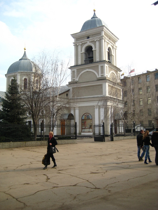 Бендерский Преображенский собор